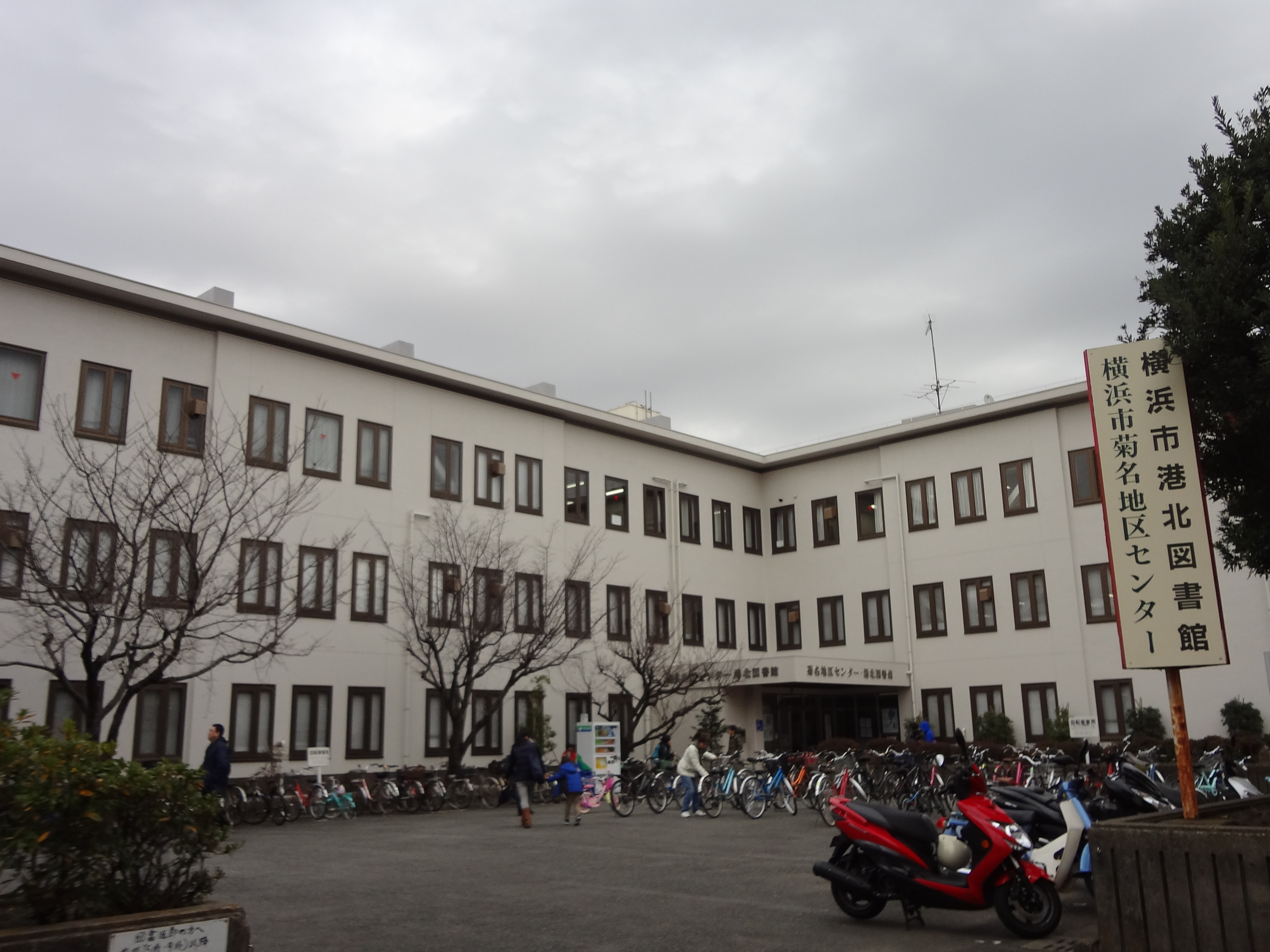 港北図書館（2016年1月23日）